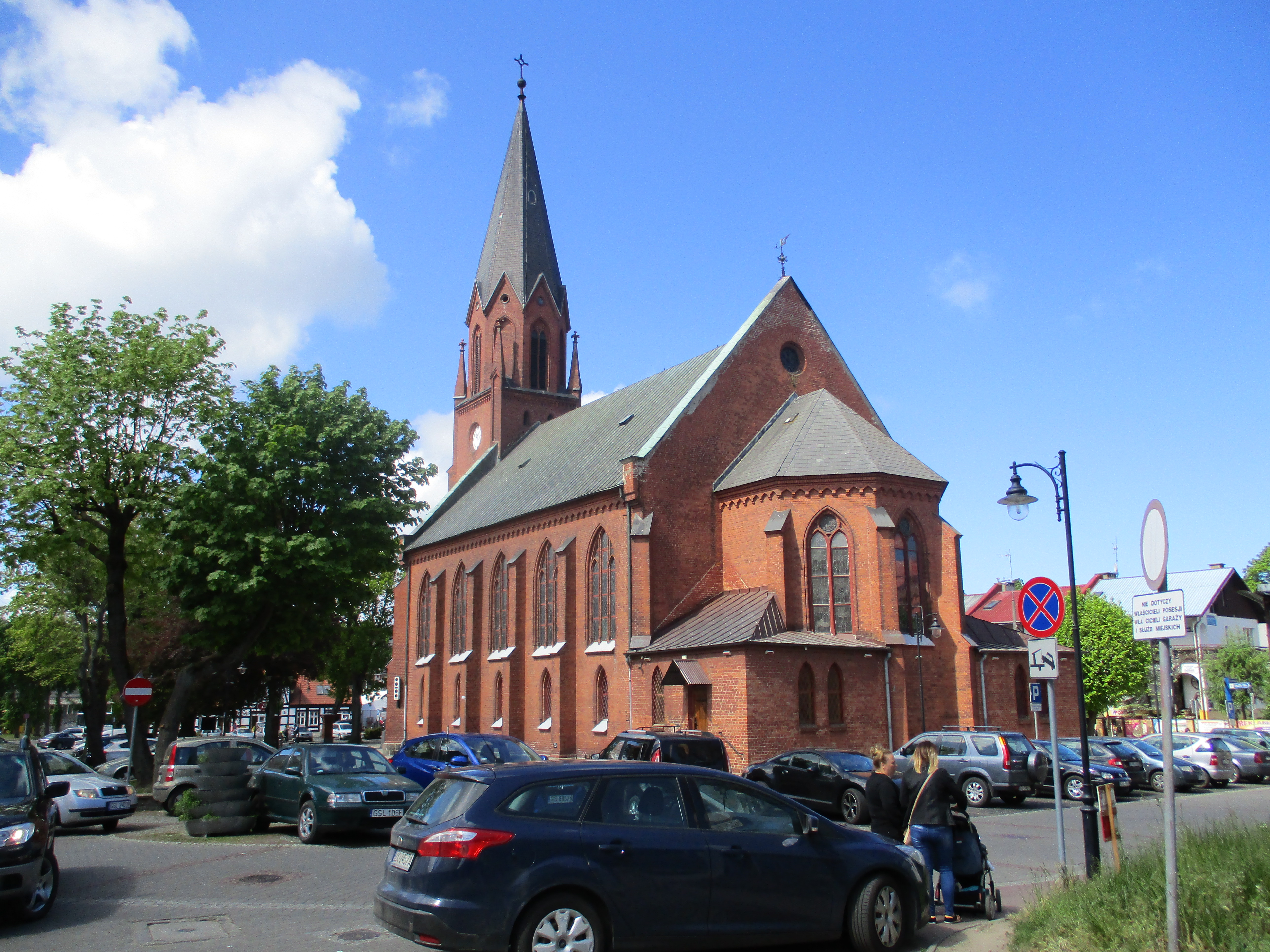 Ustka, ul. Marynarki Polskiej- church